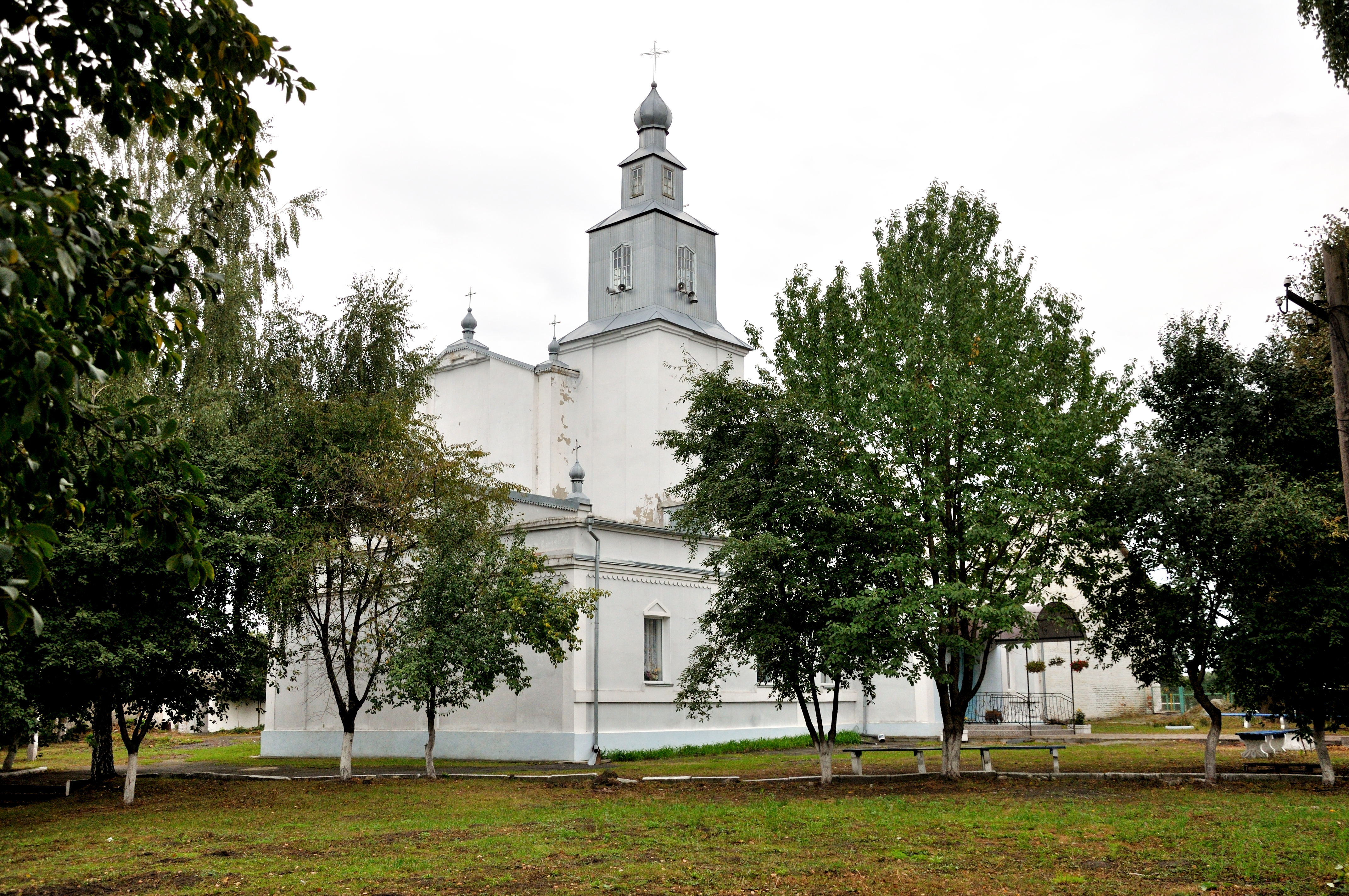 Церква Іоанна Богослова УПЦ КП, с.Бабин